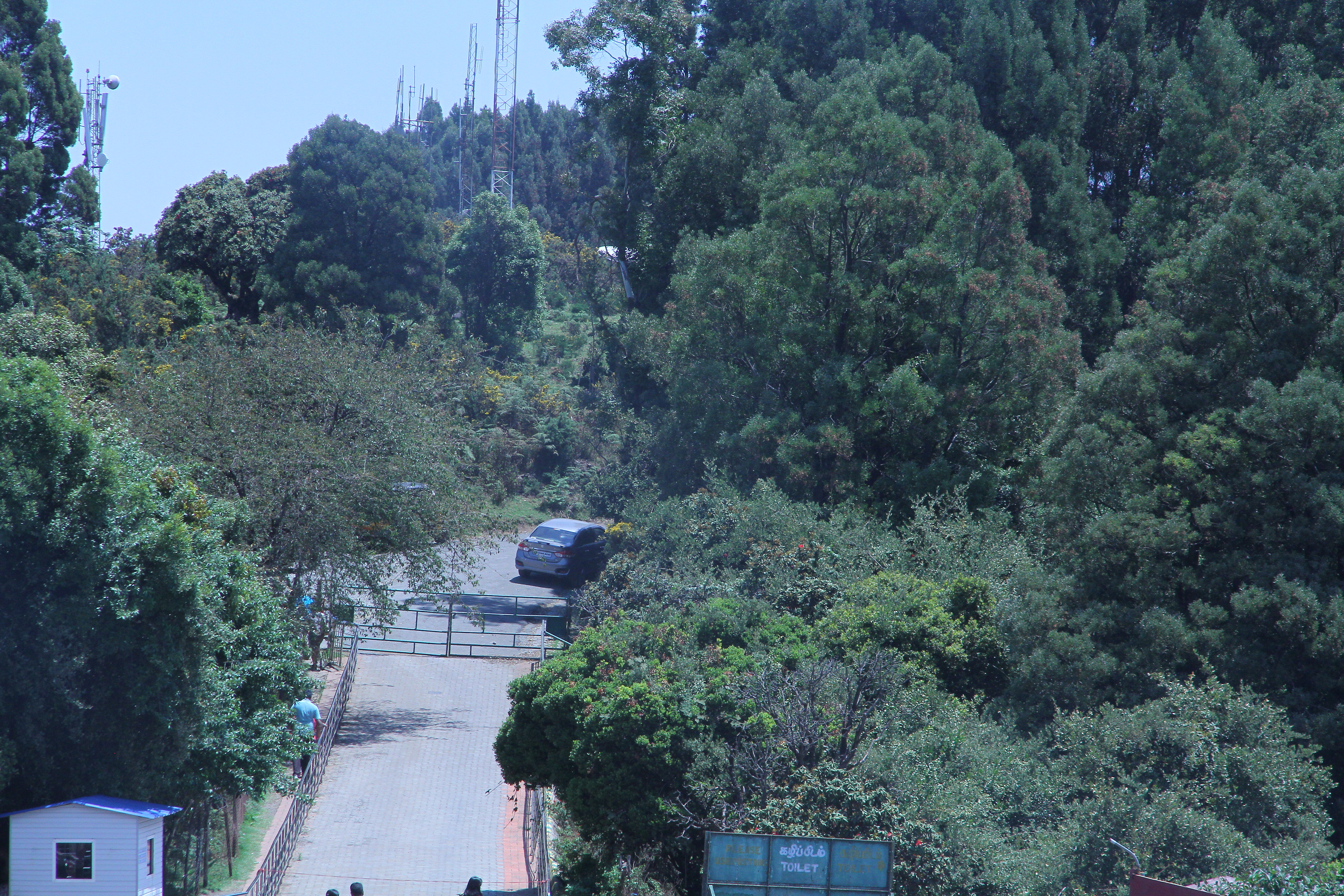 ஊட்டி, தொட்டபெட்டா - தென்இந்தியாவின் மிக உயர்ந்த சிகரம்